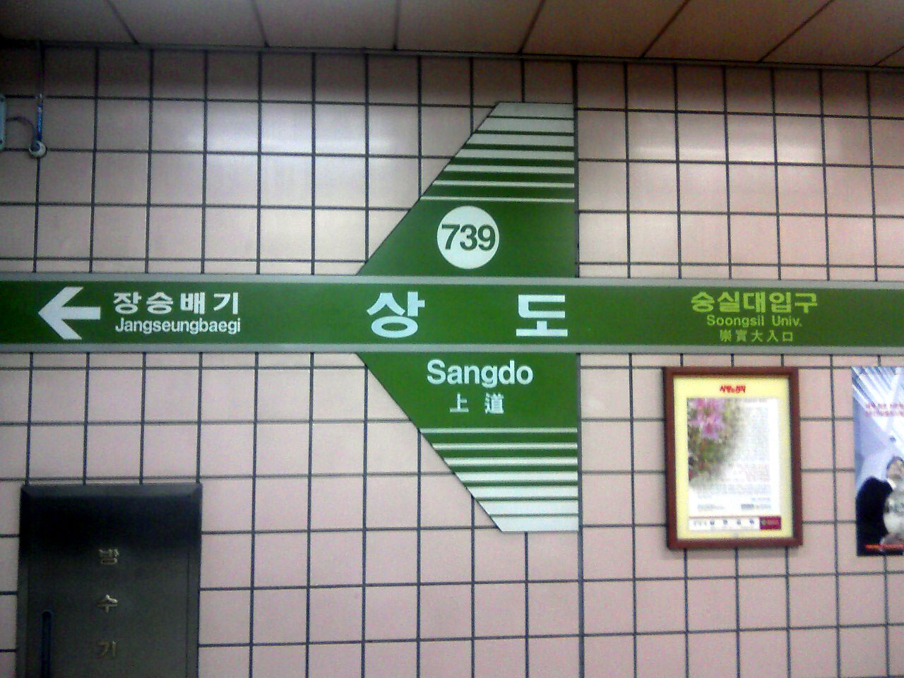 Sangdo Station (en io ja ko)